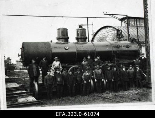 Бригада ремонтников-котельщиков Главных Заводов Балтийской железной дороги возле паровоза, отремонтированного для Советского Союза, Таллин, 1930 год